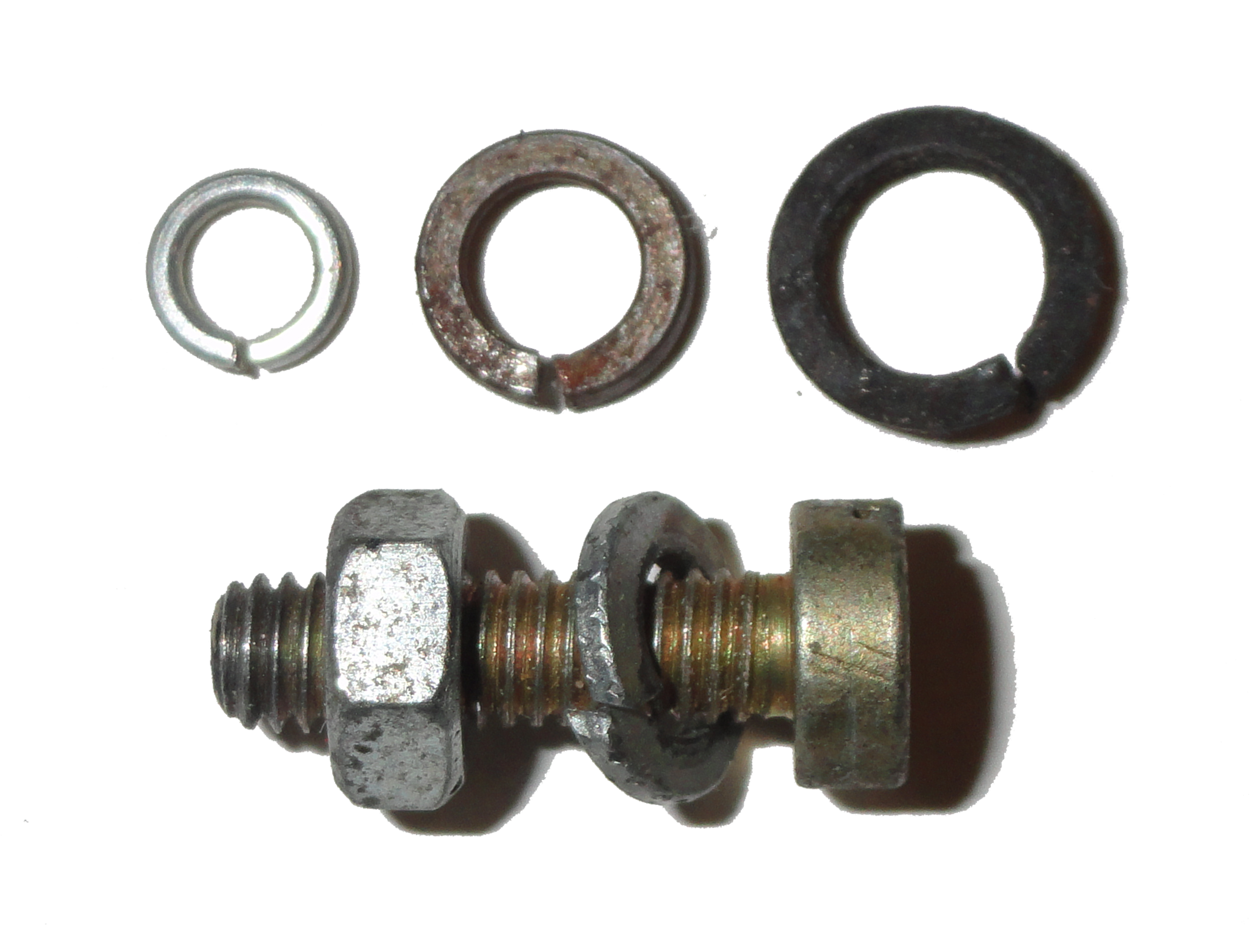 Гровер